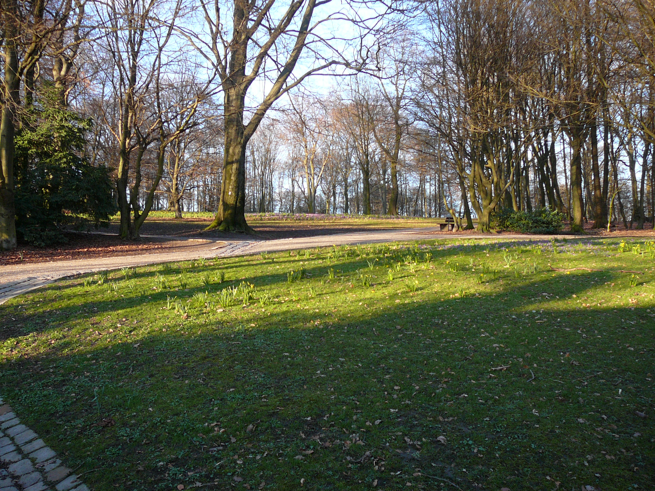 Nützenbergpark, Wuppertal-Elberfeld